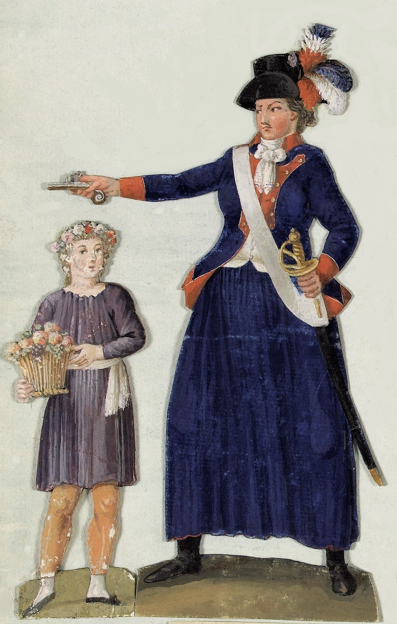 Théroigne de Méricourt. Détail d'une gouache des frères Lesueur, 1793-1795, Musée Carnavalet, Paris.